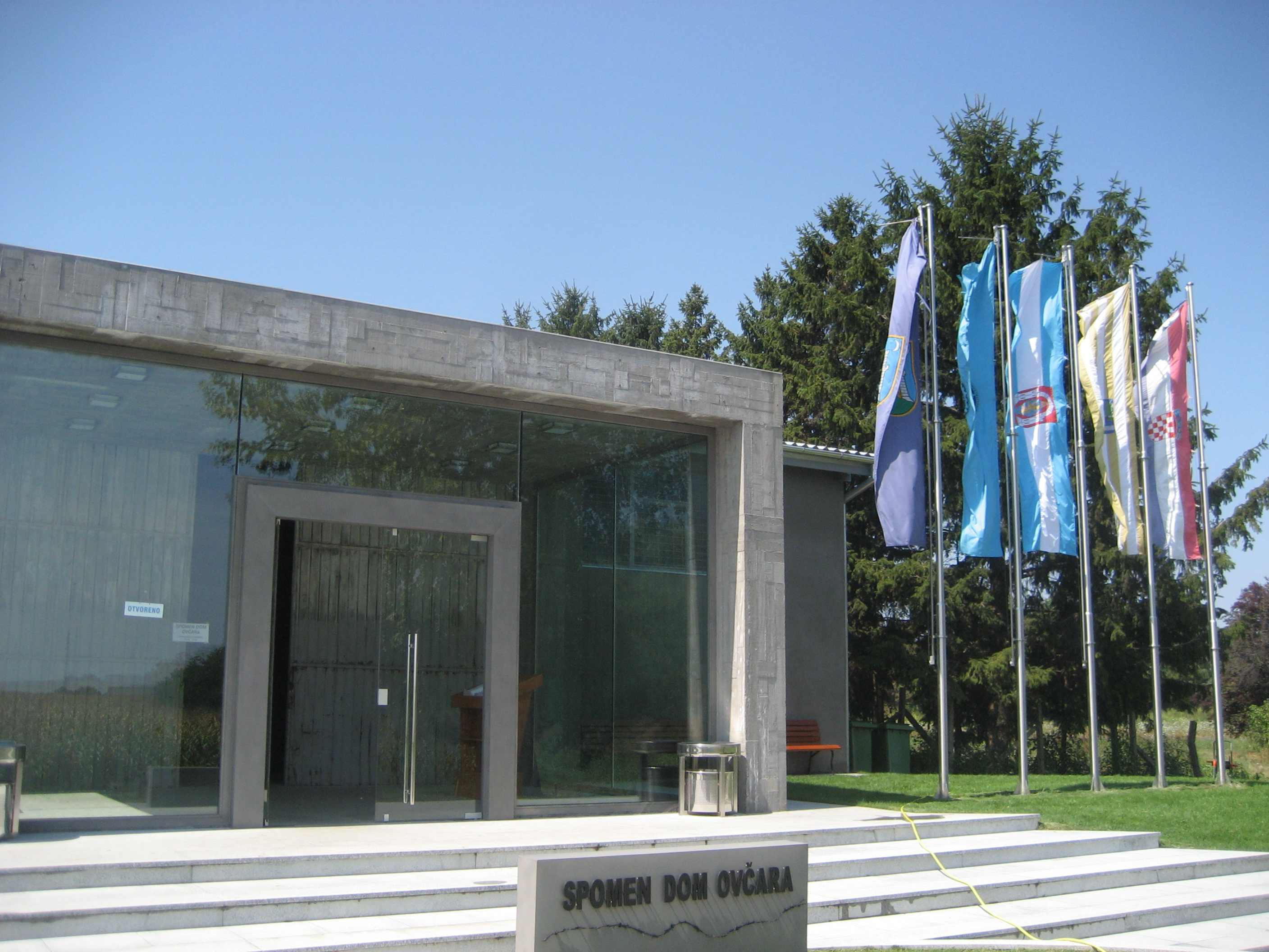 Ovcara Memorial, Near Vukovar, Croatia-1